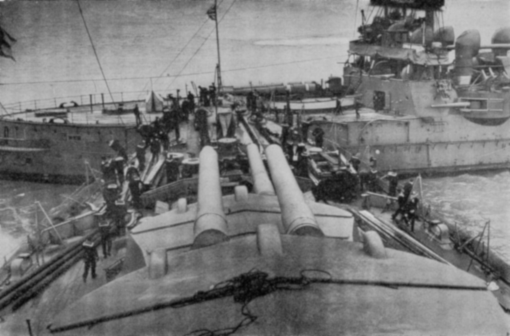 "Kollsion zweier Kriegsschiffe bei Portsmouth / Die aus ihrem Untergrund gerissene 'Revenge' rammt den Dreadnought 'Orion'"